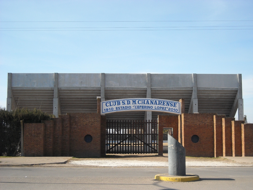 Vista del ingreso al estadio Ceferino Lopez.